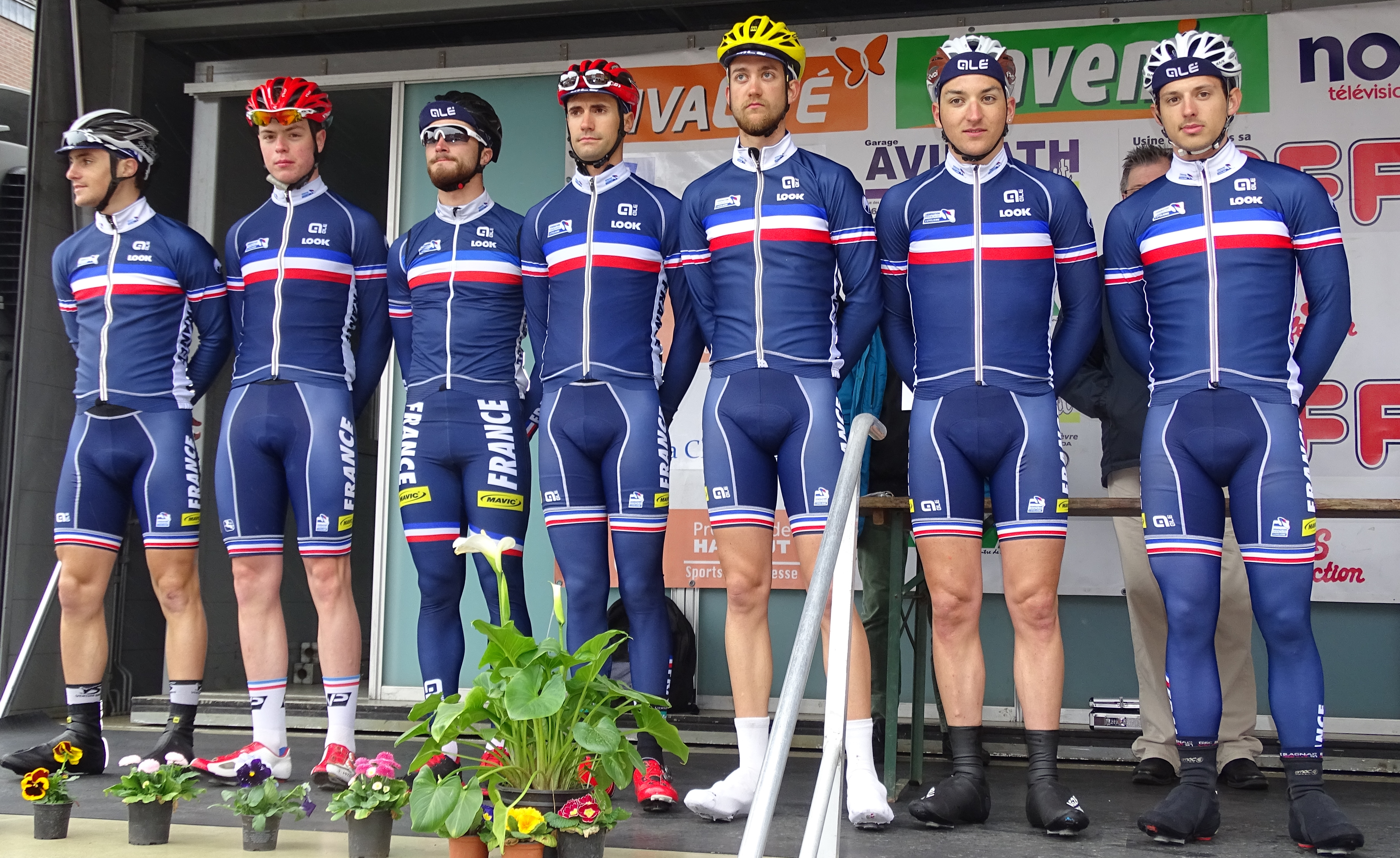 Triptyque des Monts et Châteaux 2015 Depicted people: Franck Bonnamour, Rémi Cavagna, Marc Fournier, Fabien Grellier, Thibault Nuns, Nans Peters and Yoän Vérardo Depicted team: Équipe nationale de France espoirs